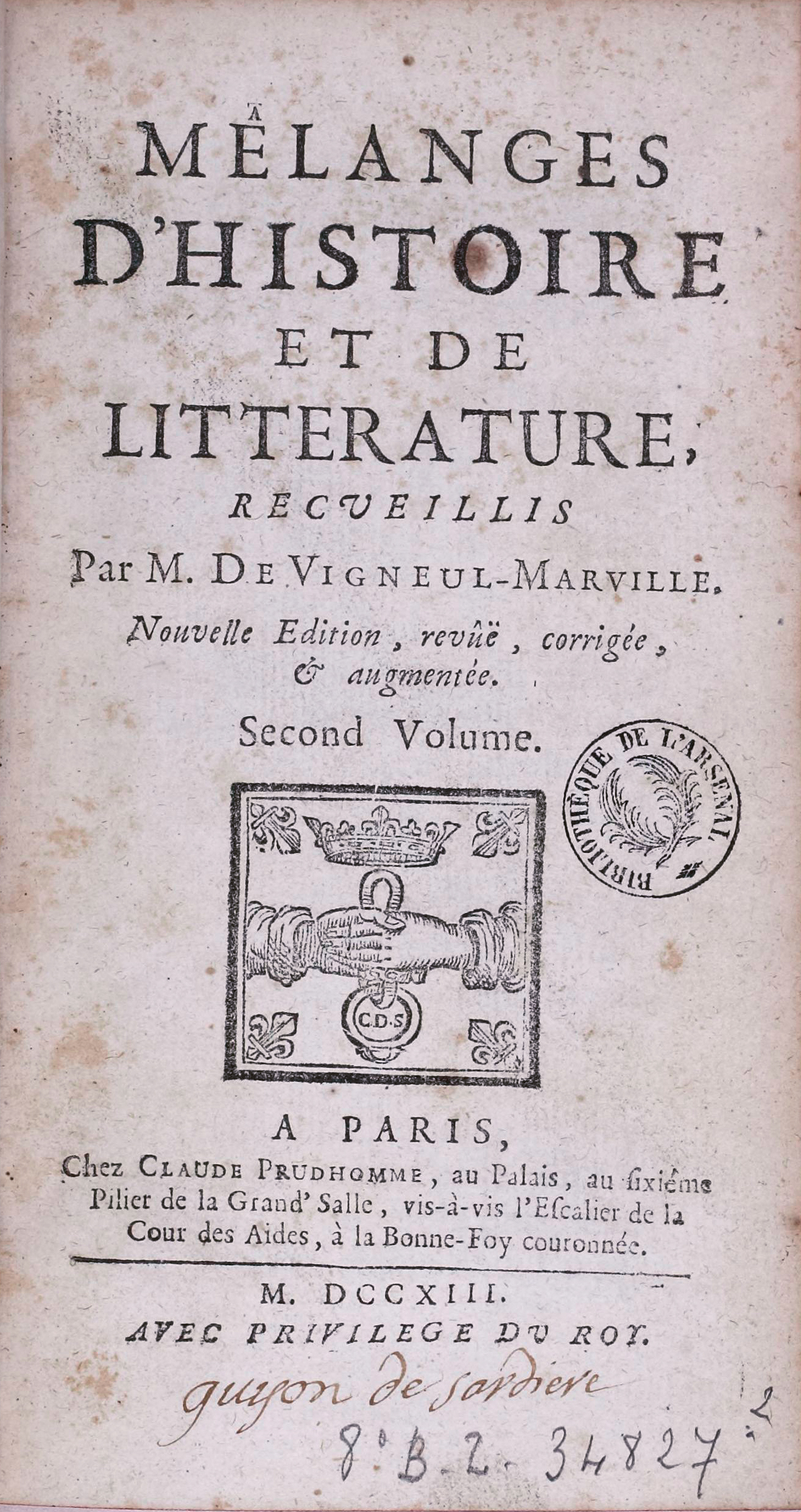 Cover page